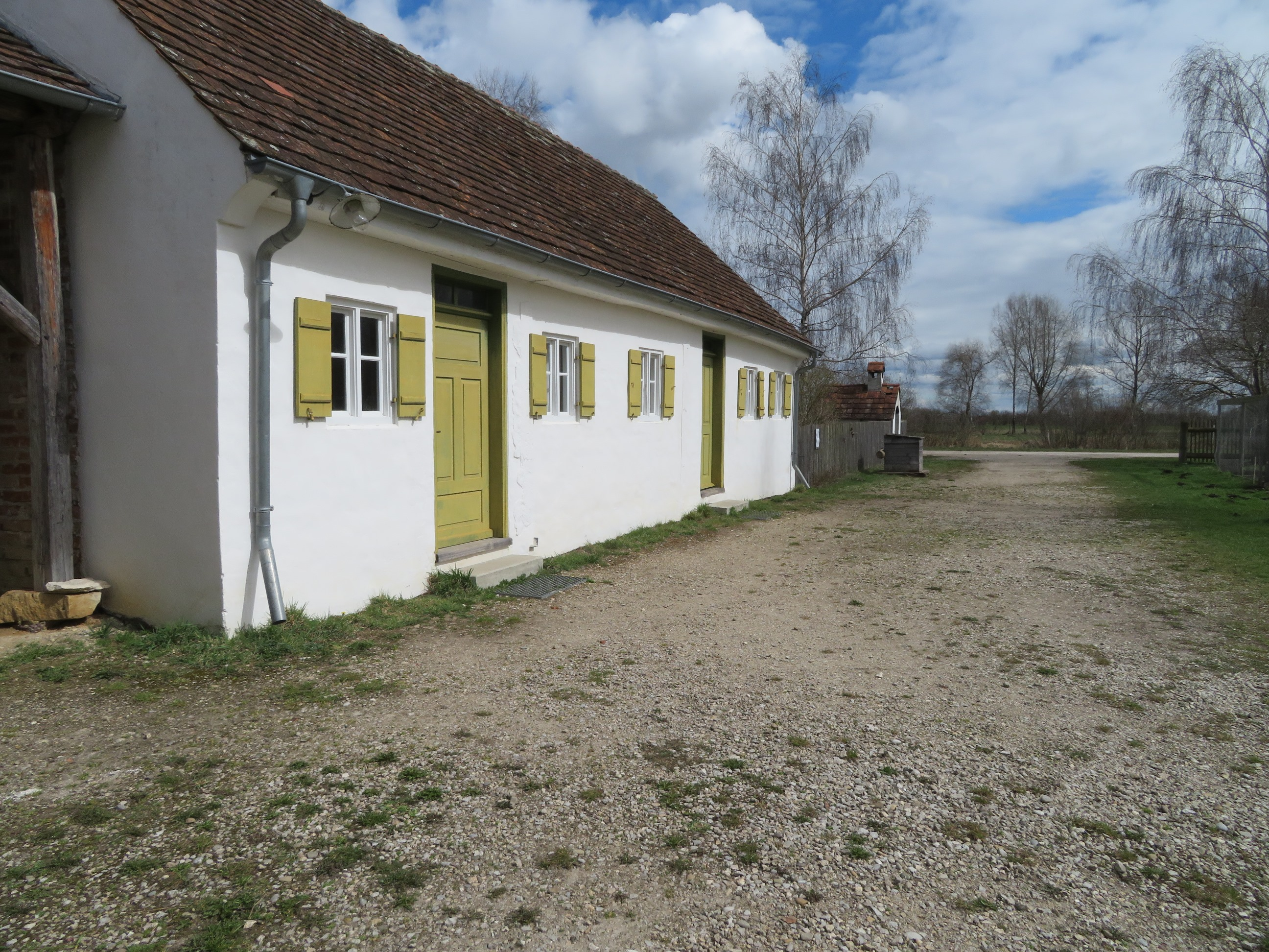 altes Bauwerk